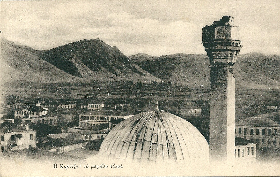 Koritza (Korçë)- La Grande Mosquée - vers 1918